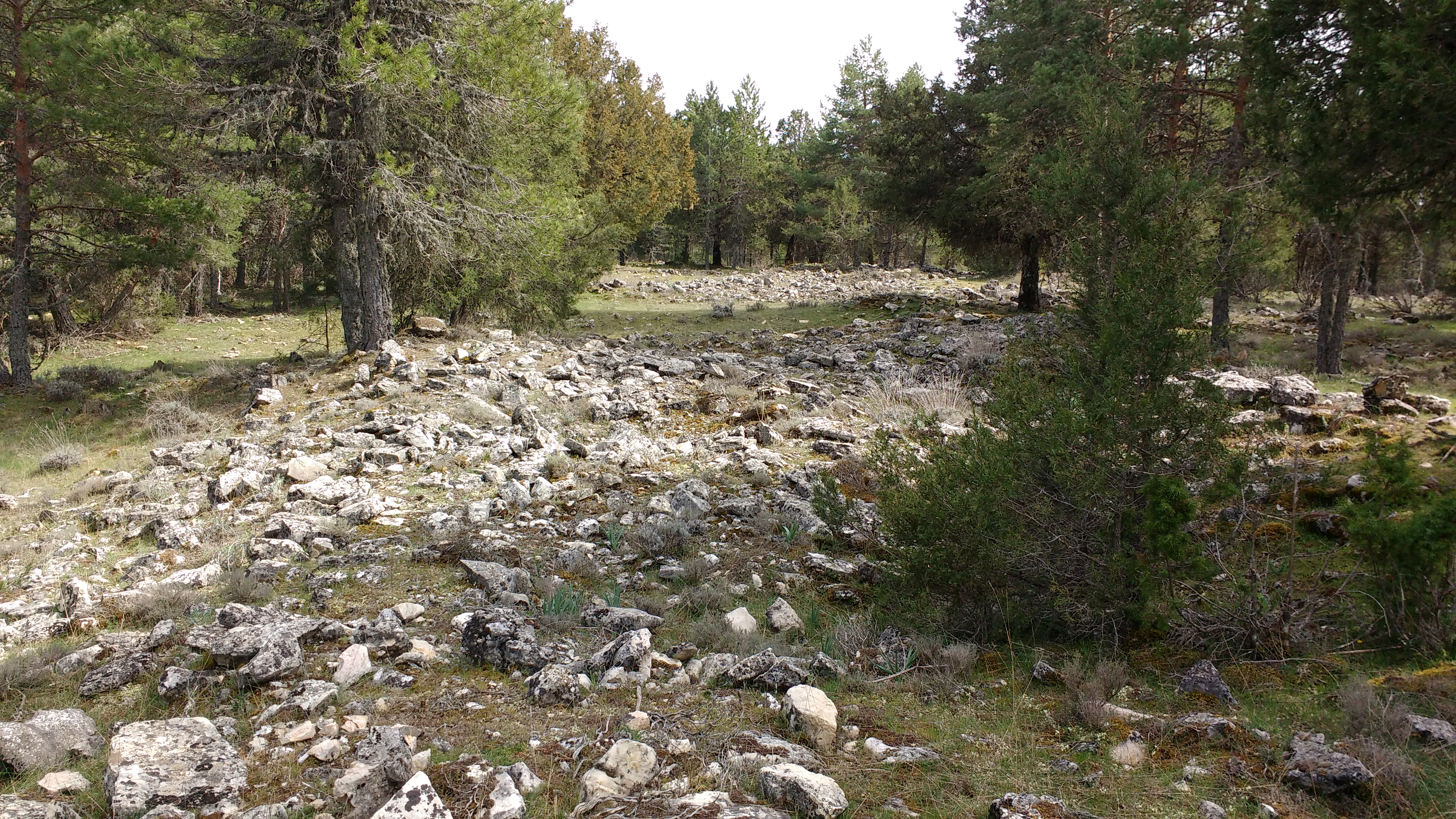 Extensión de Los Casaricios